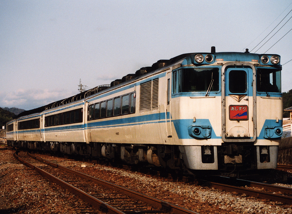 JR四国 キハ181系特急形気動車 特急「あしずり」